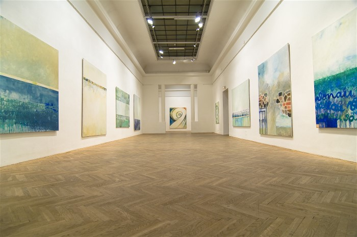 Moje Menhardt DONAUBILDER im Künstlerhaus Wien, Foto Claudia Ziegler CZ22504